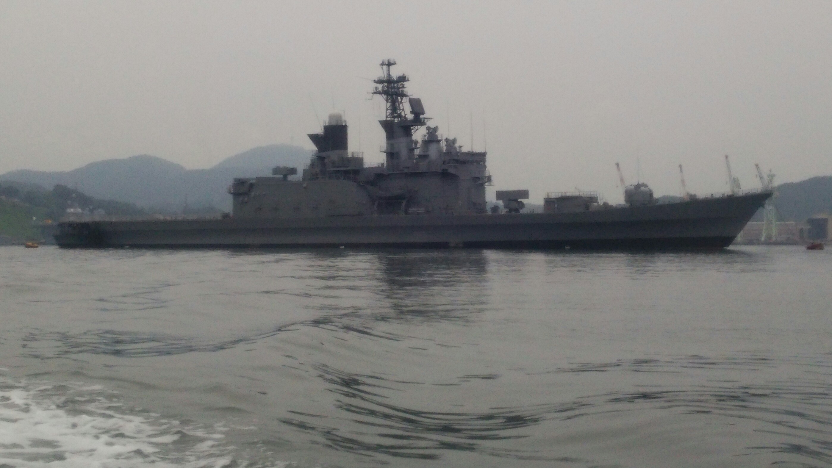 除籍後、東舞鶴港Gブイに係留中の元護衛艦｢しらね｣DDHｰ143